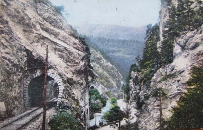 Nördlich von Moutier befinden sich die Gorges de Moutier, eine weitere typische Klus mit imposanten Kalkfelsen